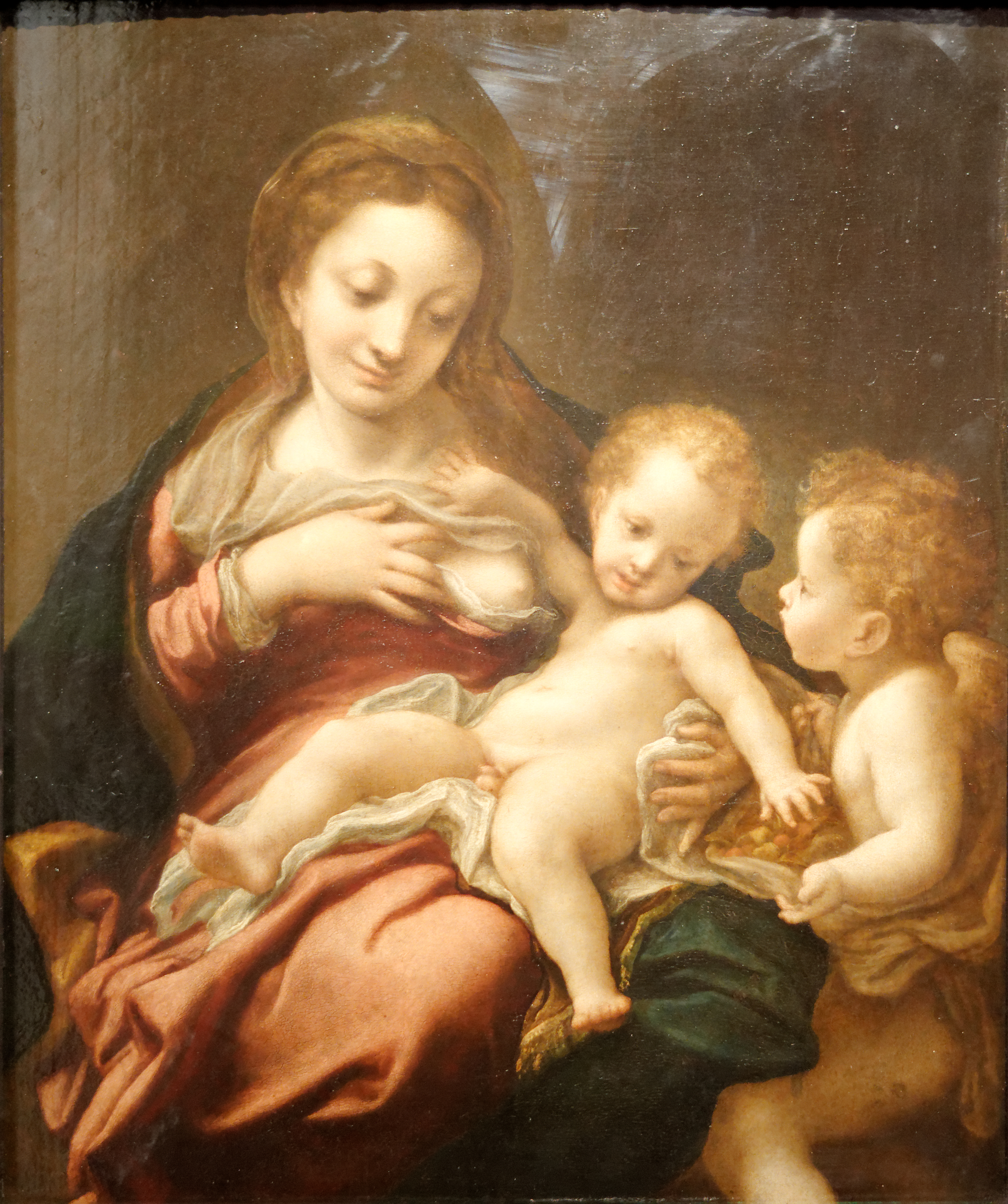 Madonna and child with an Angel (Madonna del Latte). Correggio (Antonio Allegri). Museum of Fine Arts, Budapest. Collection Esterházy, 1871. Inv. N°55